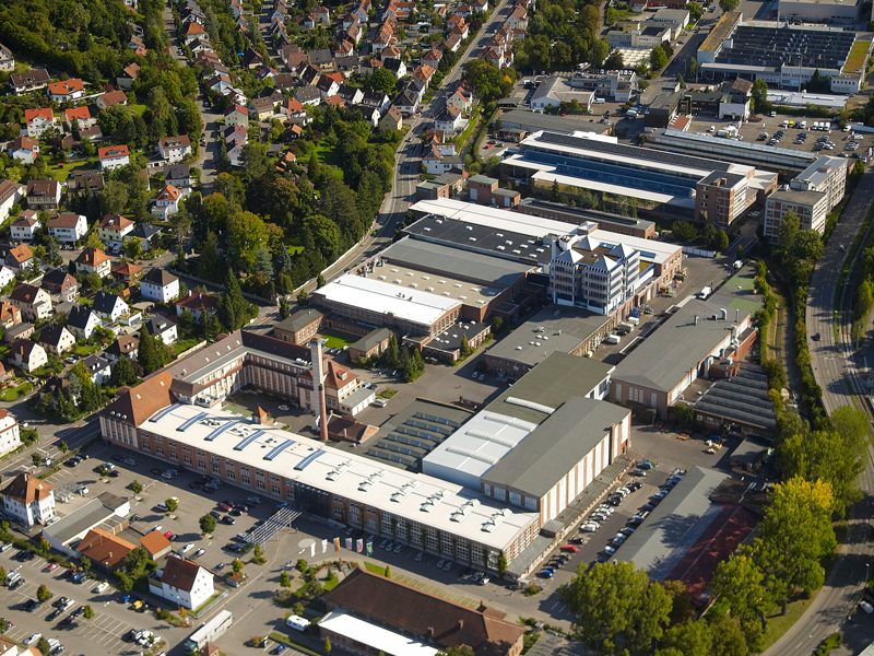 Gebr. HELLER Maschinenfabrik Werk Nürtingen